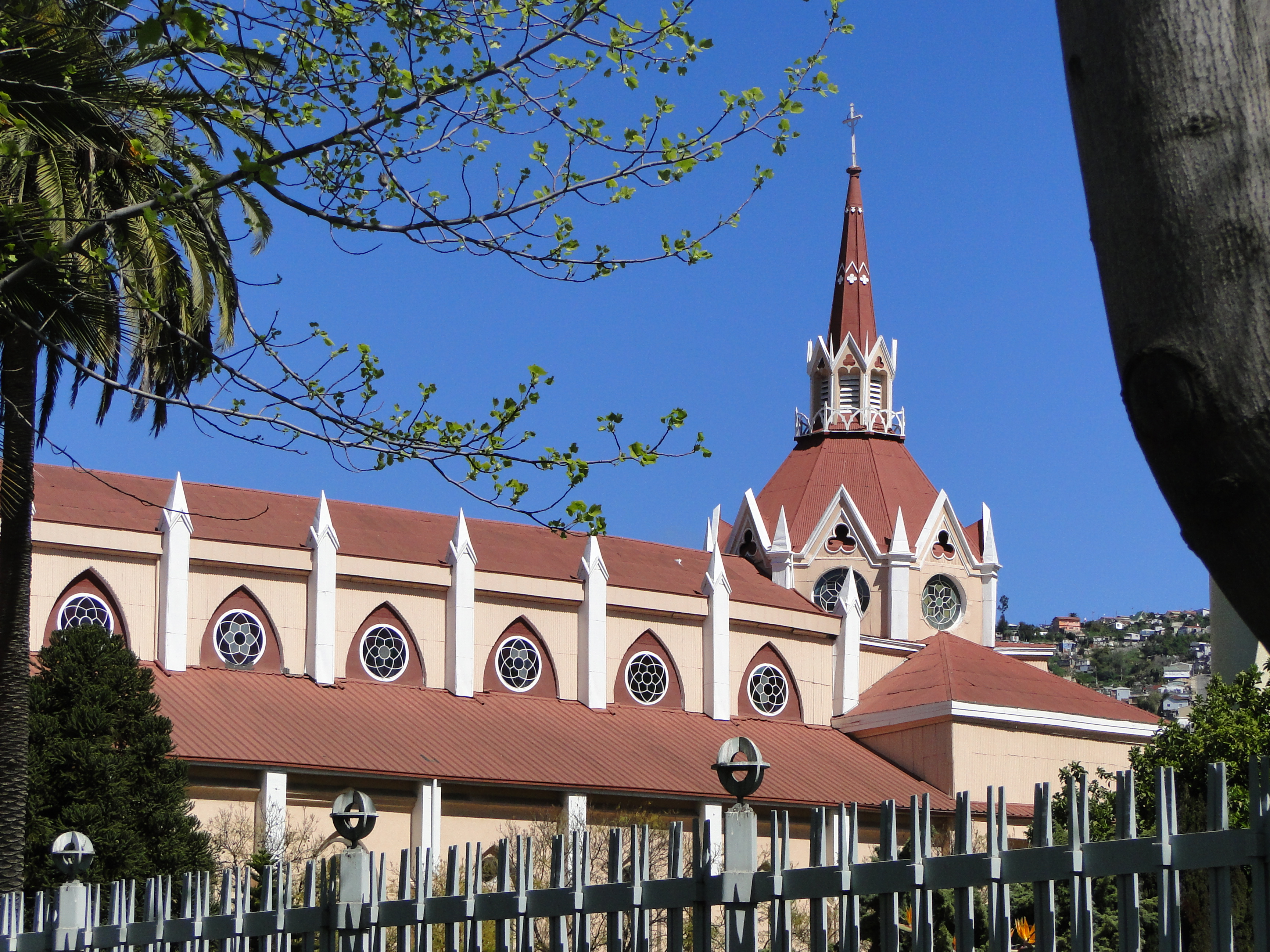 Iglesia de los Doce Apóstoles This is a photo of a national monument in Chile: 578